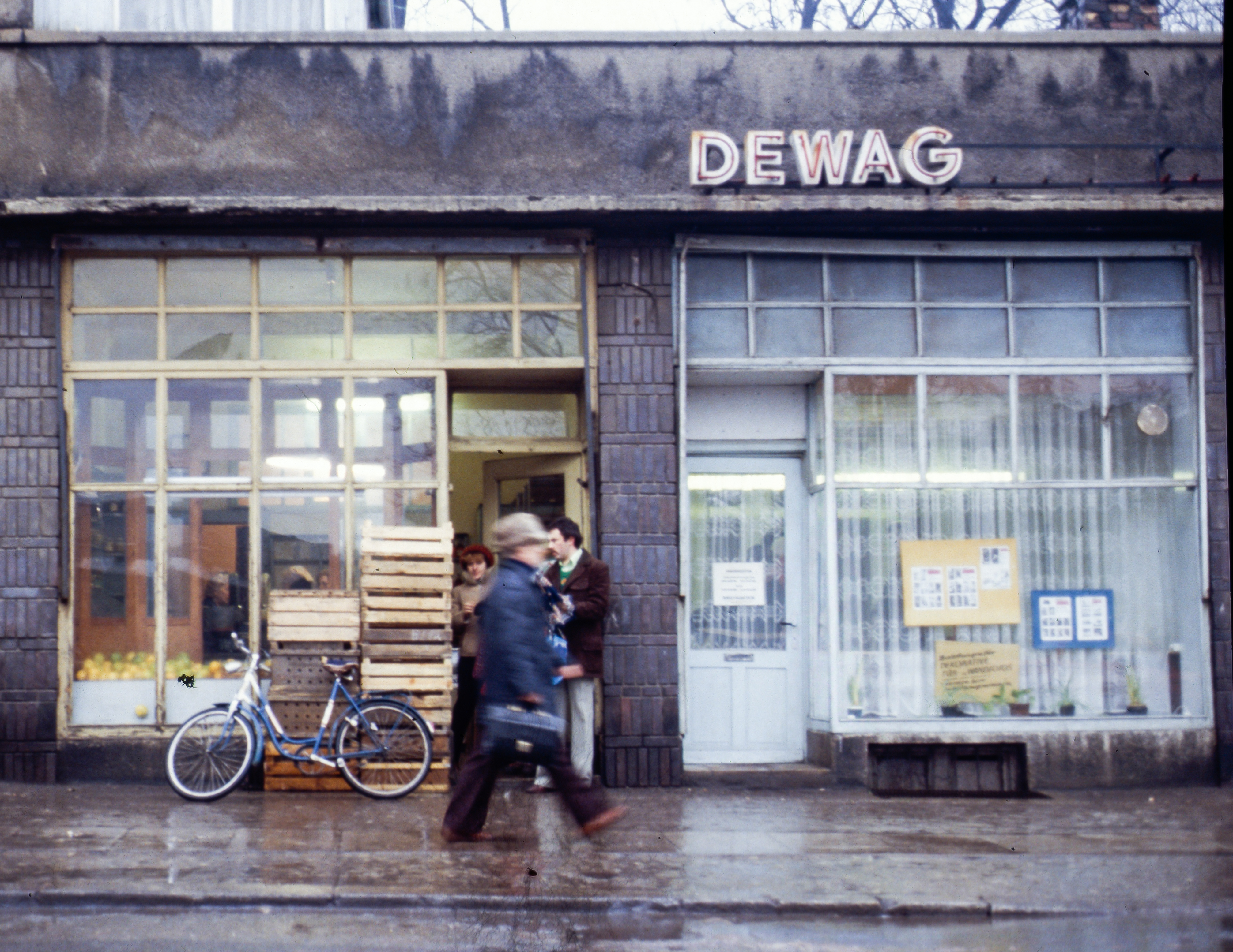 Merseburg (Bahnhofstraße), Lebensmittelgeschäft und DEWAG-Filiale